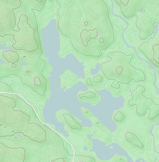 Lac Galarneau, municipalité de Mansfield-et-Pontefract, MRC de Pontiac, Outaouais, Québec